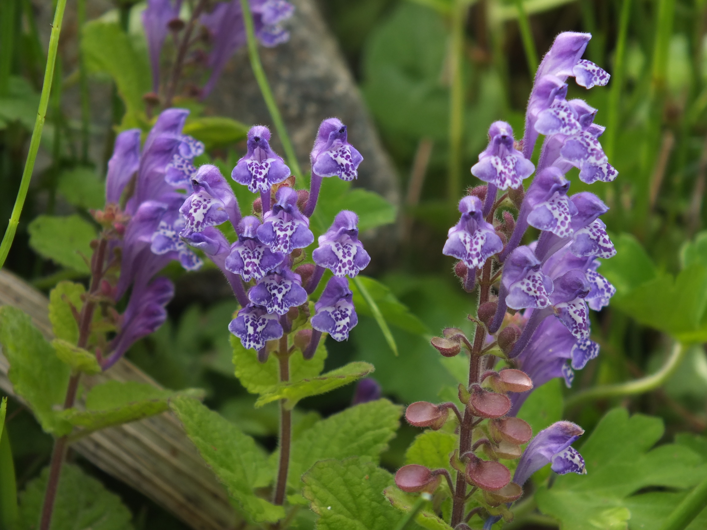 Scutellaria タツナミソウ やしろの森公園